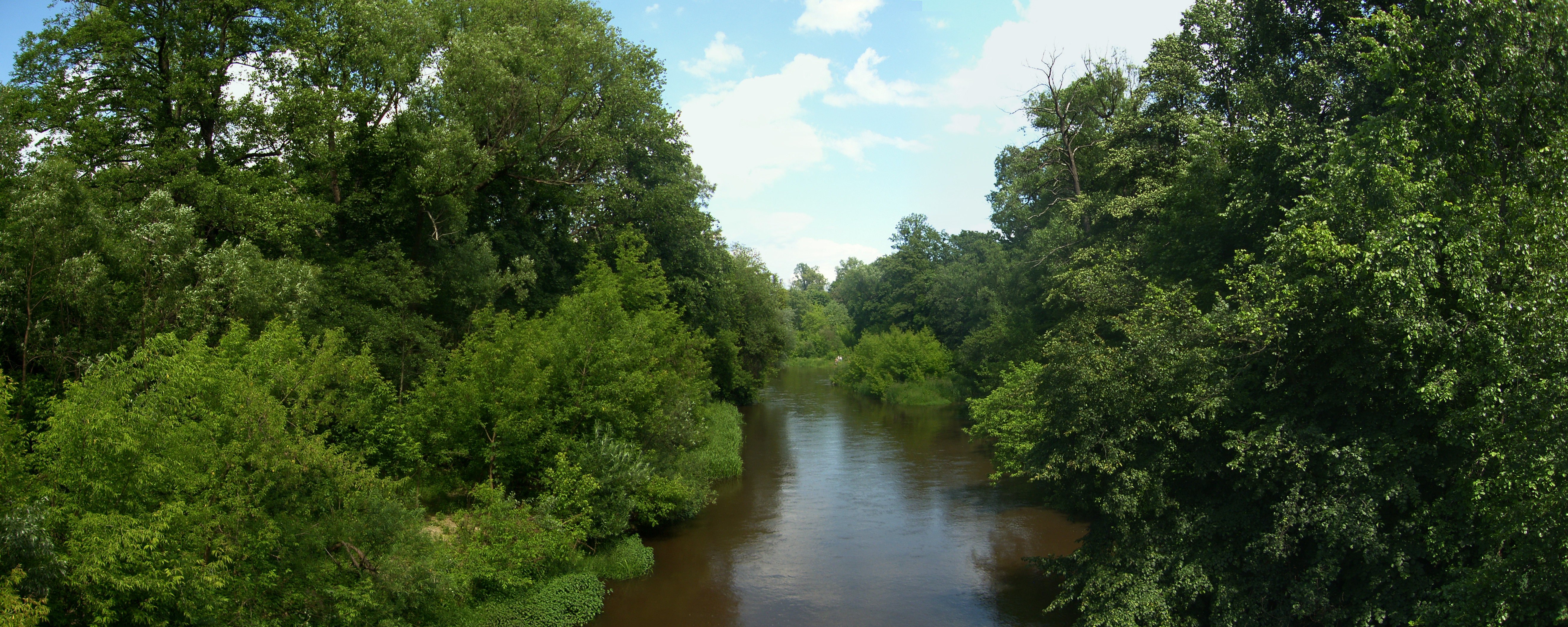 Rzeka Świder (widok z mostu drogowego pomiędzy Otwockiem a Józefowem)